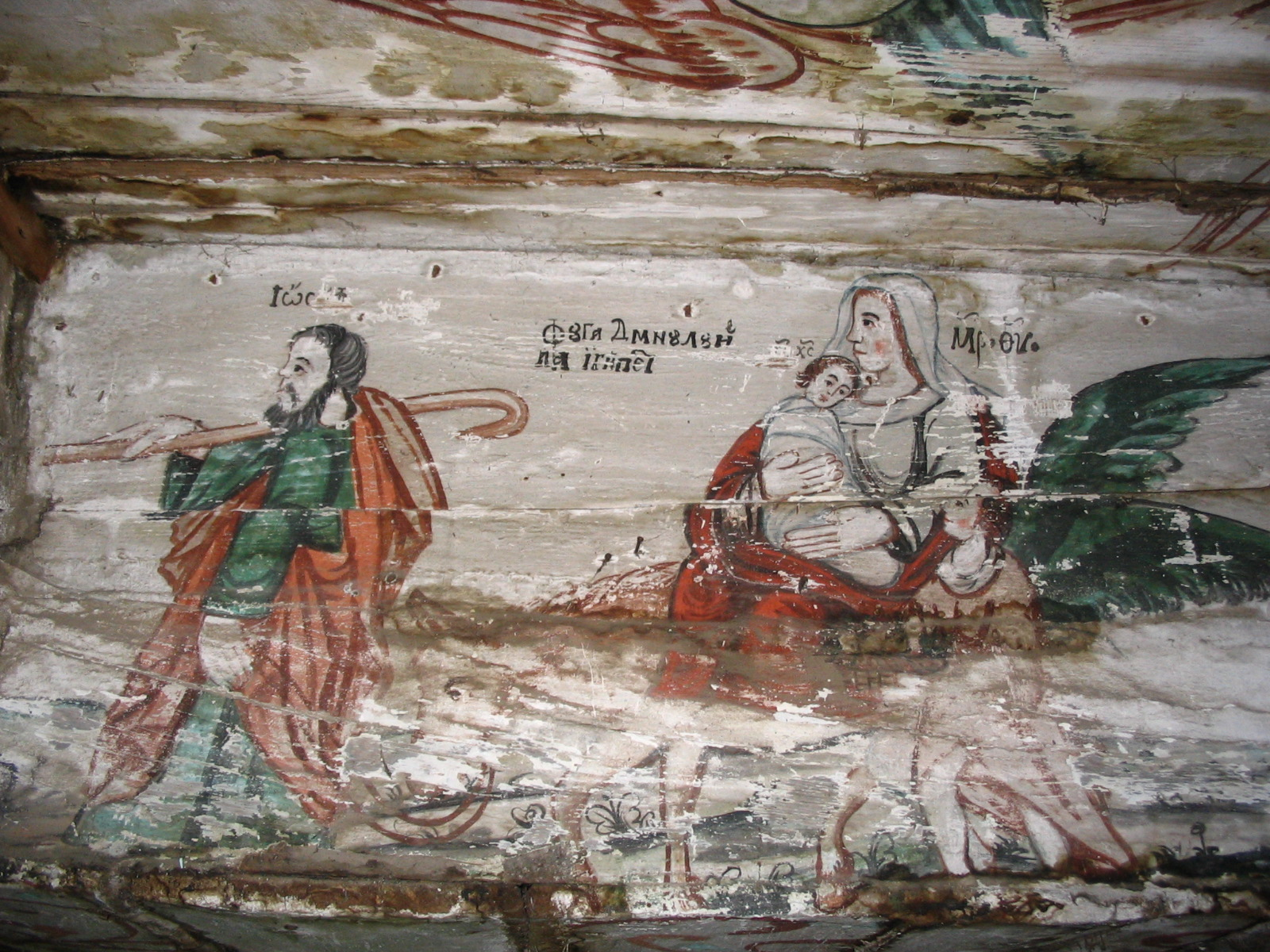 Biserica de lemn din Sânmihaiu Almaşului, judeţul Sălaj. Detaliu pictură. Fuga Domnului în Egipt.